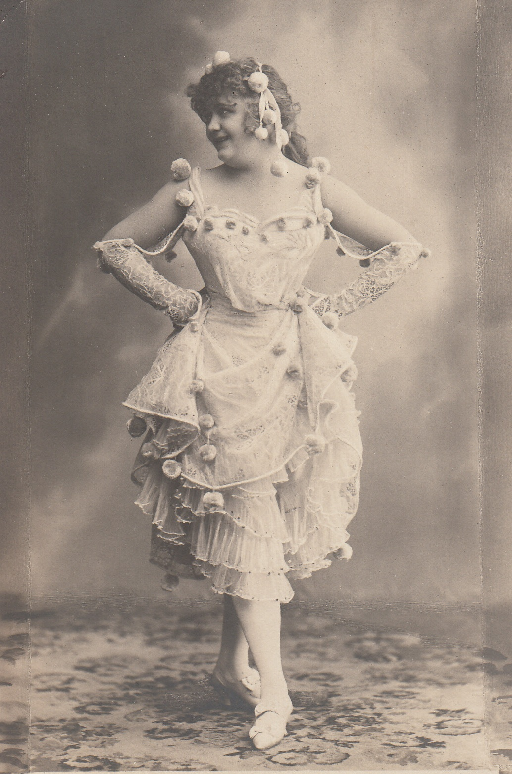 Szoyer Ilonka ismeretlen szerepben. Postcard.